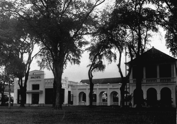 Foto. Het Oranjehotel te Makassar op Celebes.